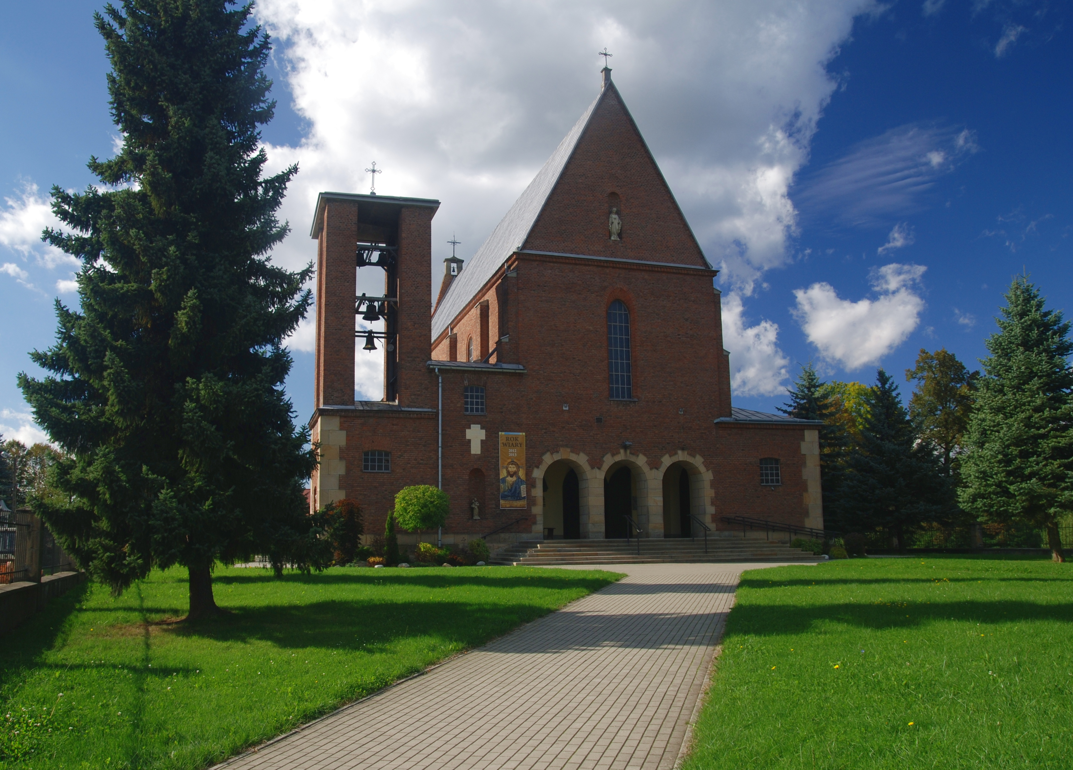 Kombornia, kościół par. p.w. Matki Boskiej Pocieszenia, 1932